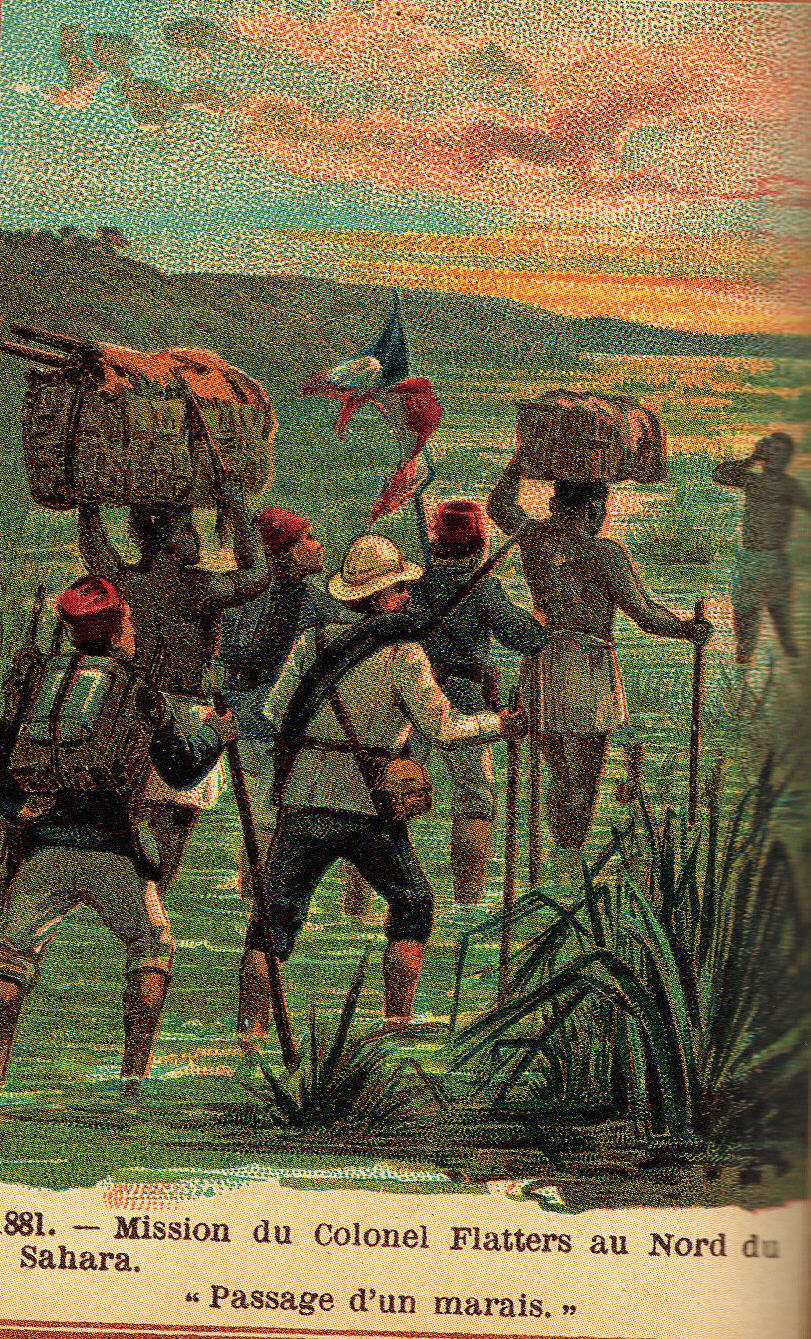 Sammelbild von Chocolat Lombart: 1881. Mission du Colonel Flatters au Nord du Sahara. Passage d'un marais